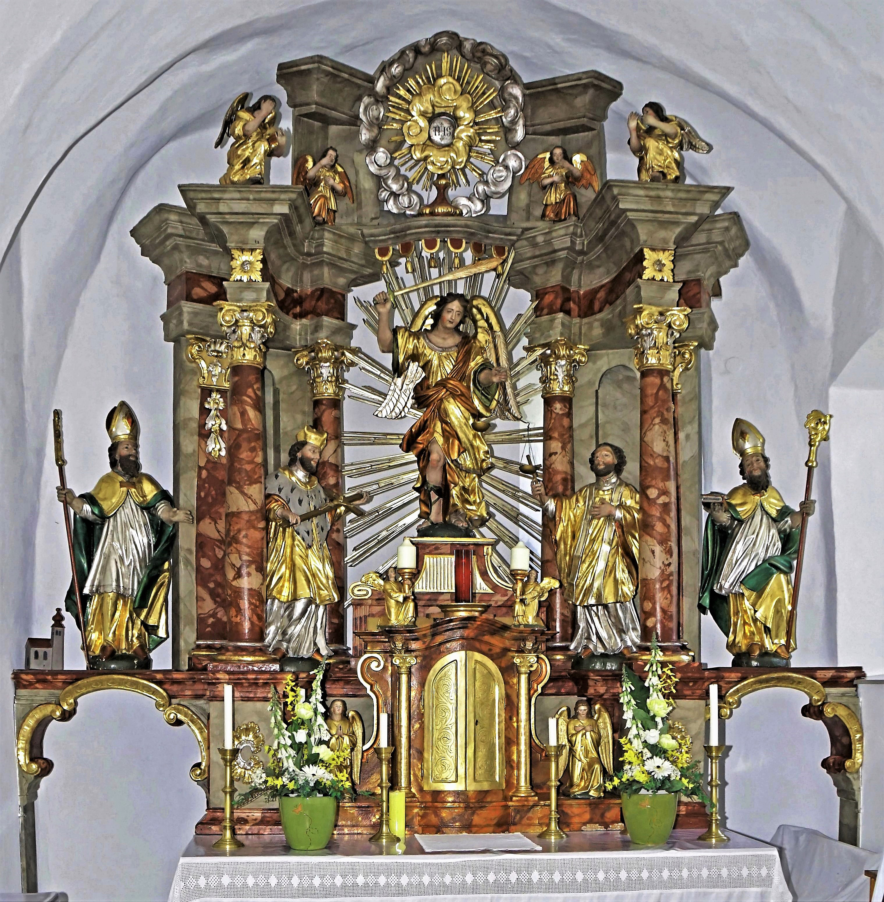 Kath. Pfarrkirche Fürnitz, barocker Hochaltar